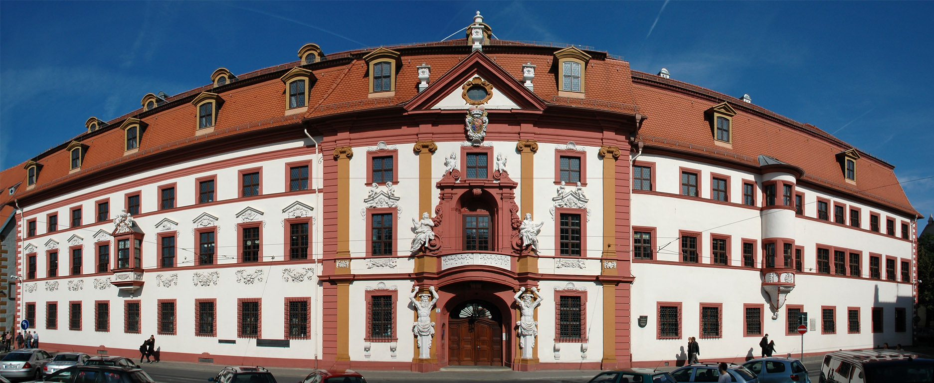 Hauptgebäude der Kurmainzischen Statthalterei in der Regierungstraße in Erfurt